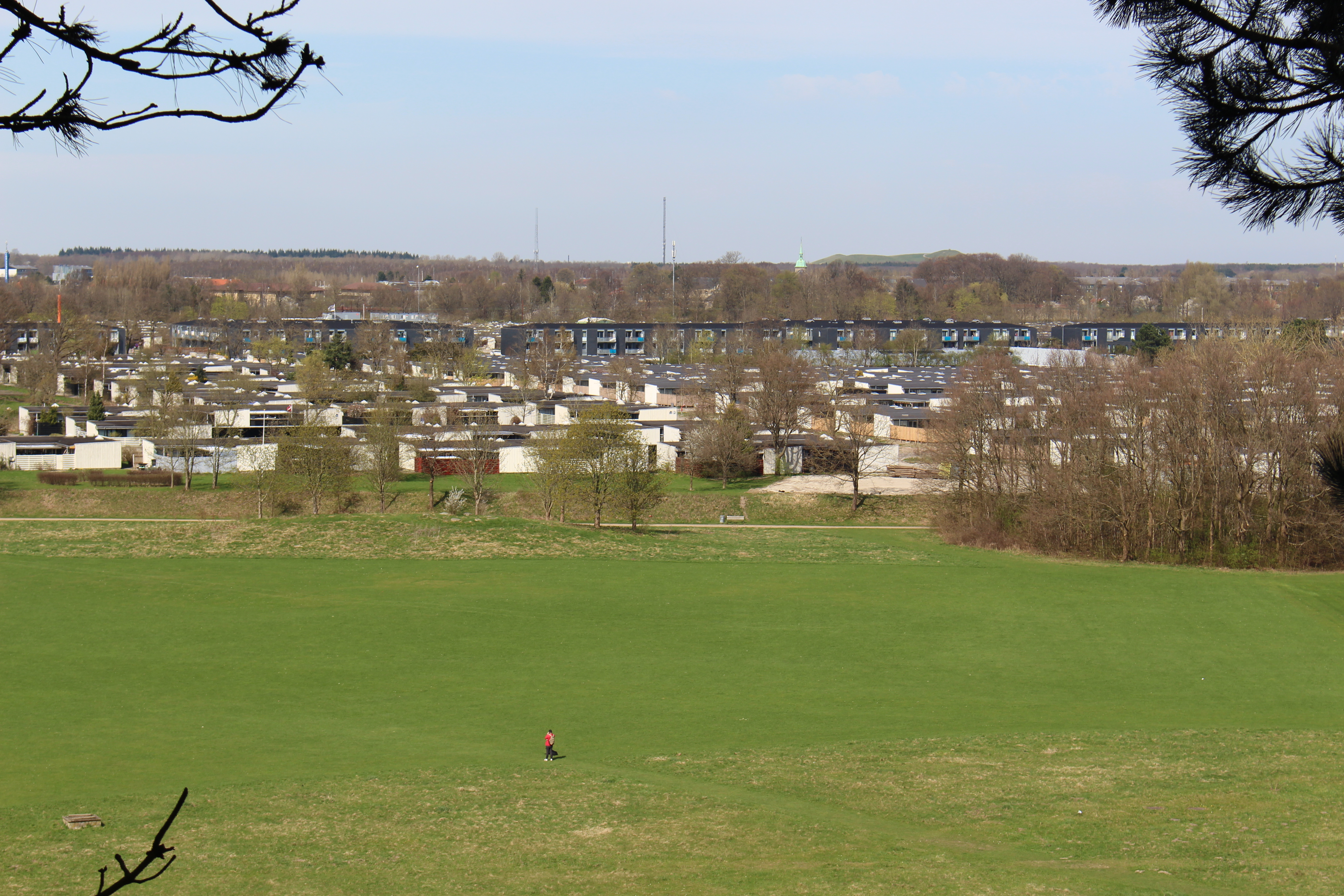 Albertslund Syd